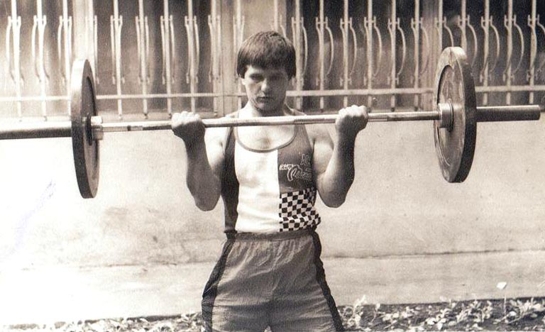 Vasile Craciun - culturist din Braila, Romania